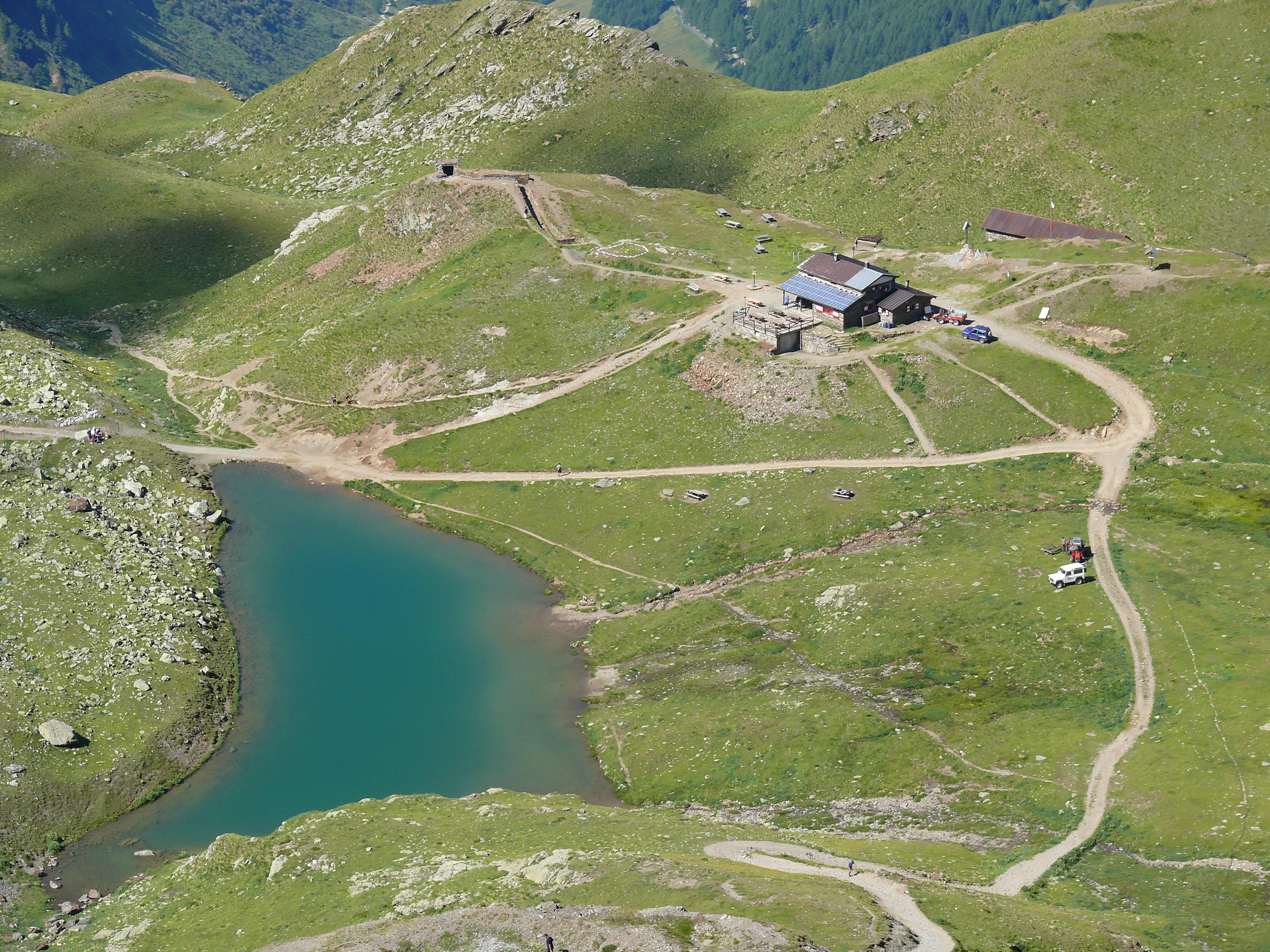 PANORAMA DAL RIFUGIO BOZZI